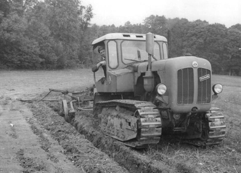 Hohenziritz, Vorbereitung der Aussaat Zentralbild Koziel Wei-sch. 22.9.1956 Nach der Getreideernte wird sofort die Winterfurche gezogen Die Traktoristen Fritz Fleischmann und Karl Hauff von der MTS "Fortschritt" Neustrelitz führten als beste des Kreises vor wenigen Tagen noch ihren Mähdrescher über die Felder. Jetzt bereiten sie in zwei Schichten das Saatbeet für die Winterzwischenfrucht vor. UBz: Karl Hauff mit dem Gleiskettenschlepper KS 30 beim Ziehen der Saatfurche in der Gemeinde Hohenzieritz.